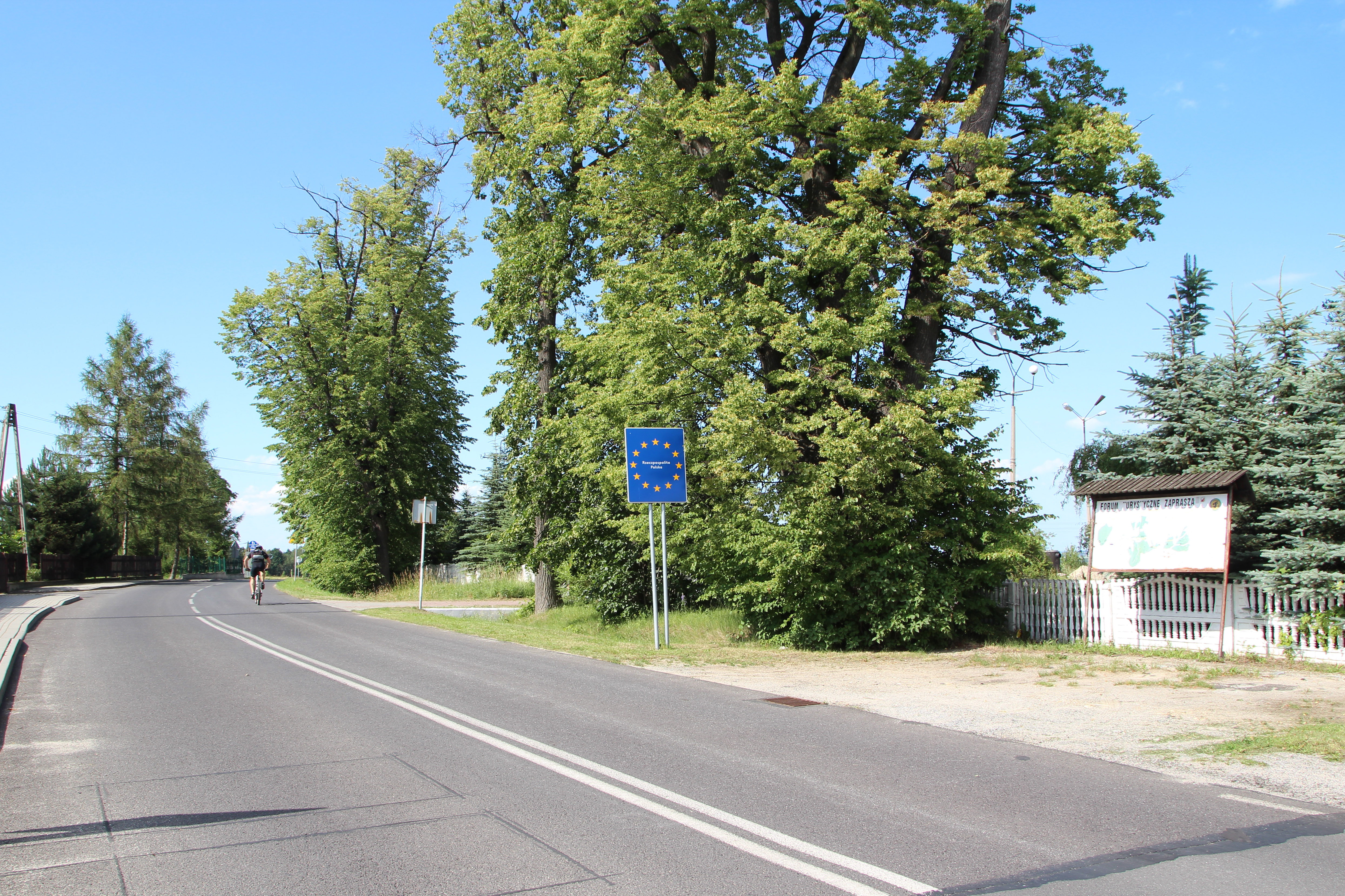 Przejście graniczne Konradów-Zlaté Hory – polsko-czeskie drogowe przejście graniczne położone w województwie opolskim, w powiecie nyskim, w gminie Głuchołazy.